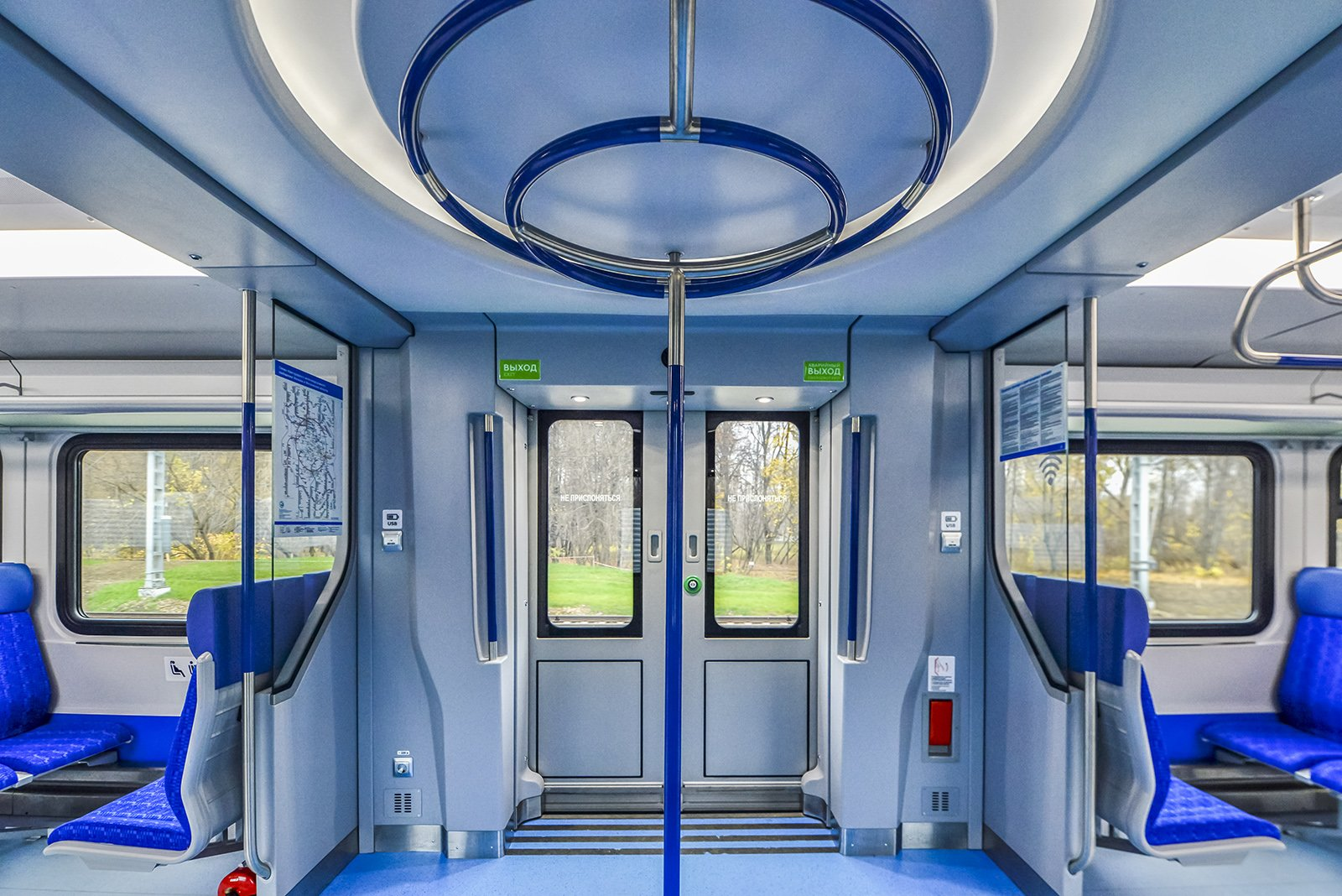 Двери и входная зона электропоезда ЭГ2Тв Иволга